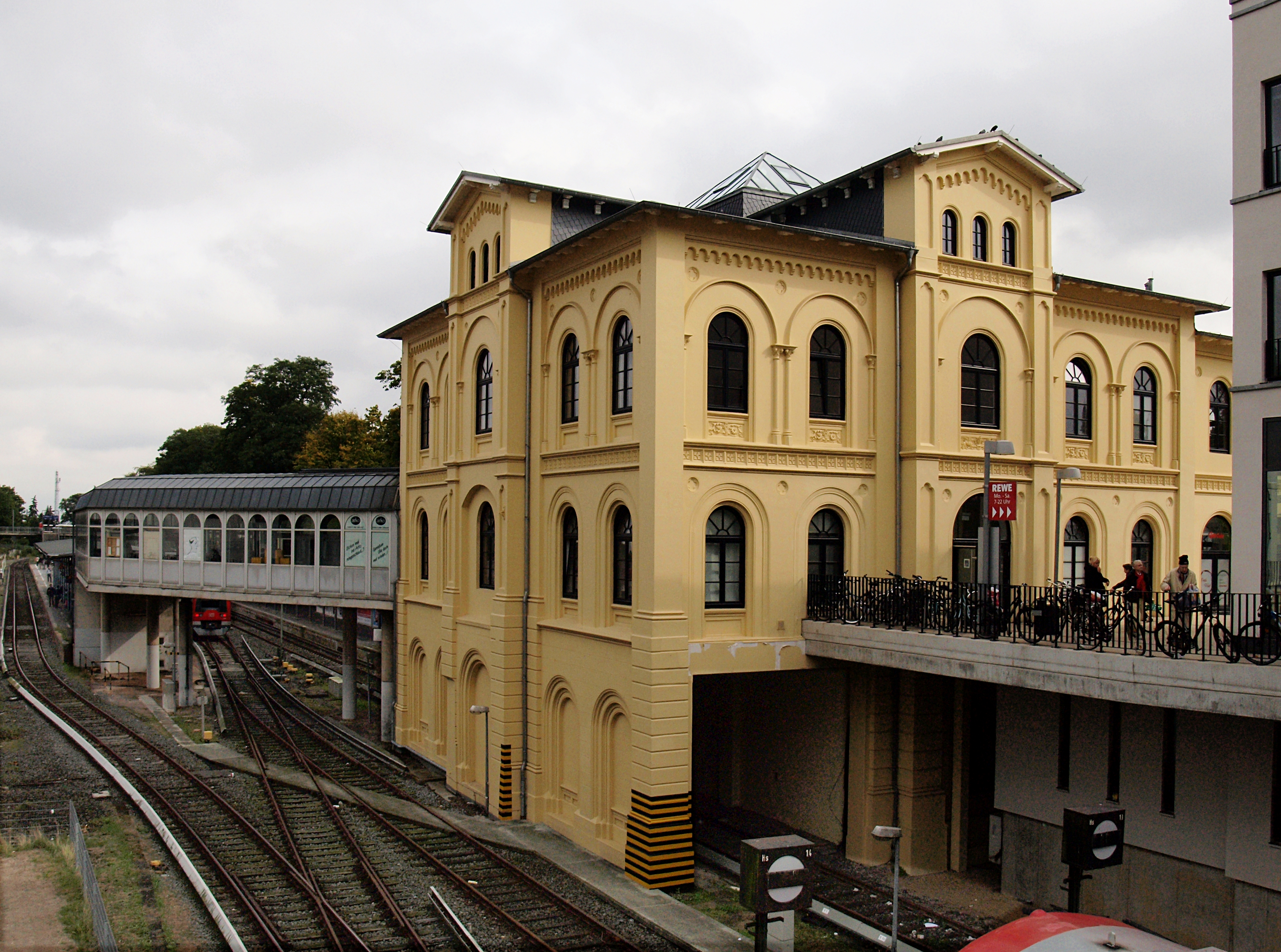 1866 bis 1867 entstandenes BahnhofempfangsgebäudeThis is a photograph of an architectural monument.